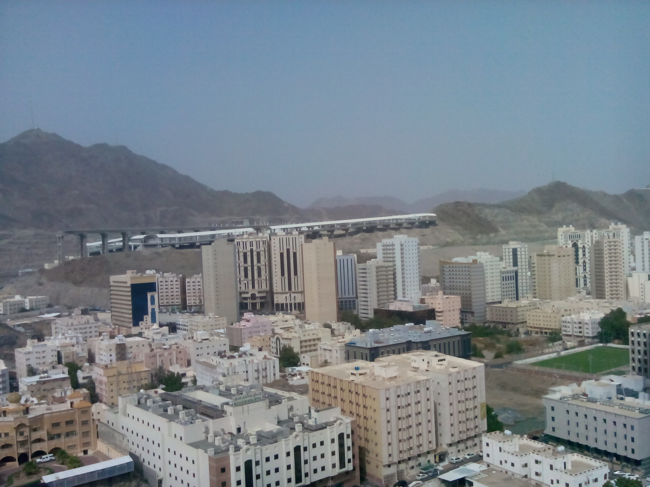 معالم مدينة مكة في حي العزيزية